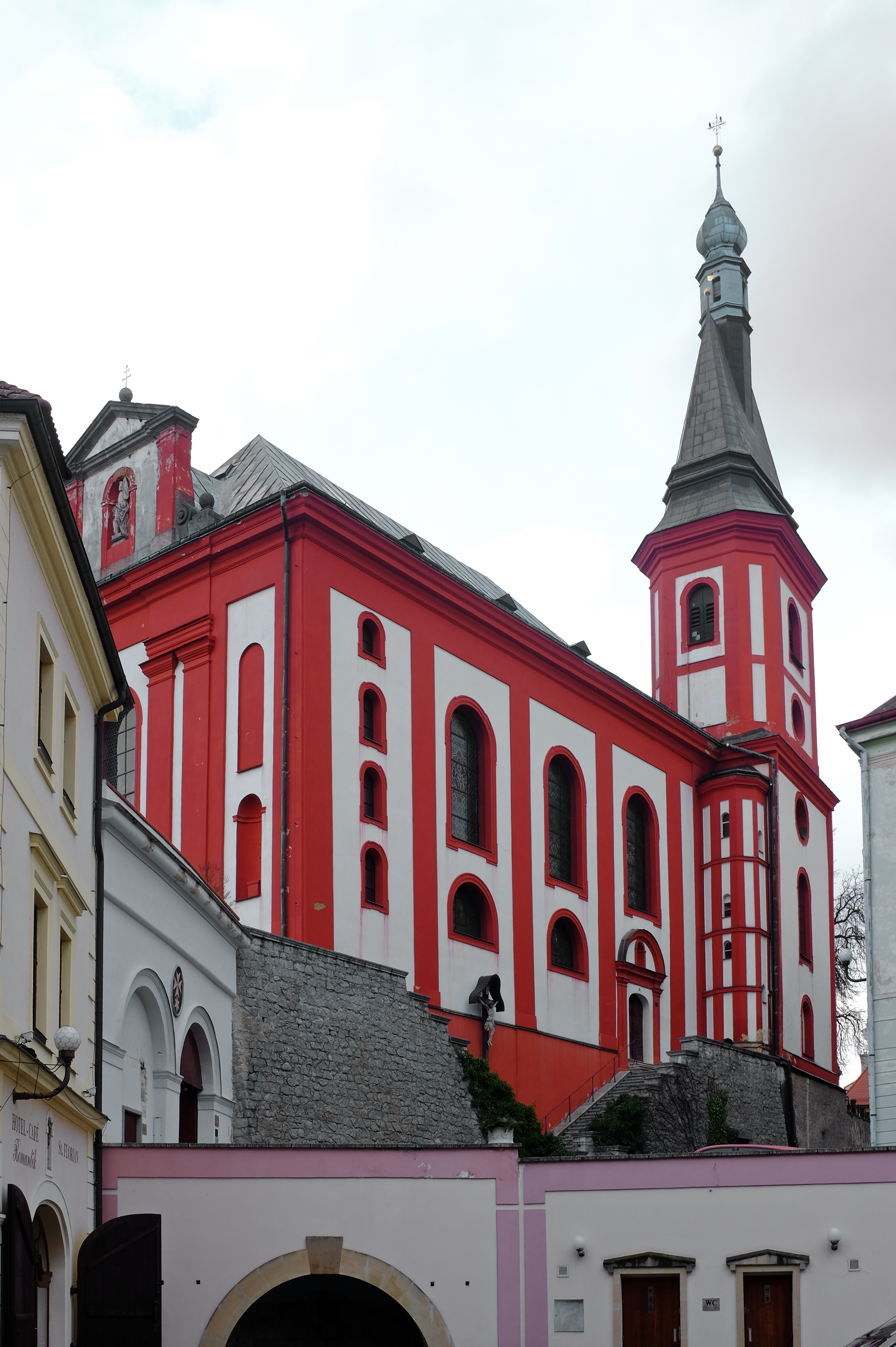 Kostel svatého Václava, Kostelní 14/3, Loket (okres Sokolov).